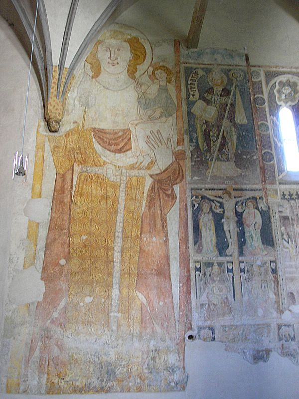 Alte Pfarrkirche St. Martin (Garmisch, Obb.). Der "Heilige Christophorus" (um 1330). Juni 2006